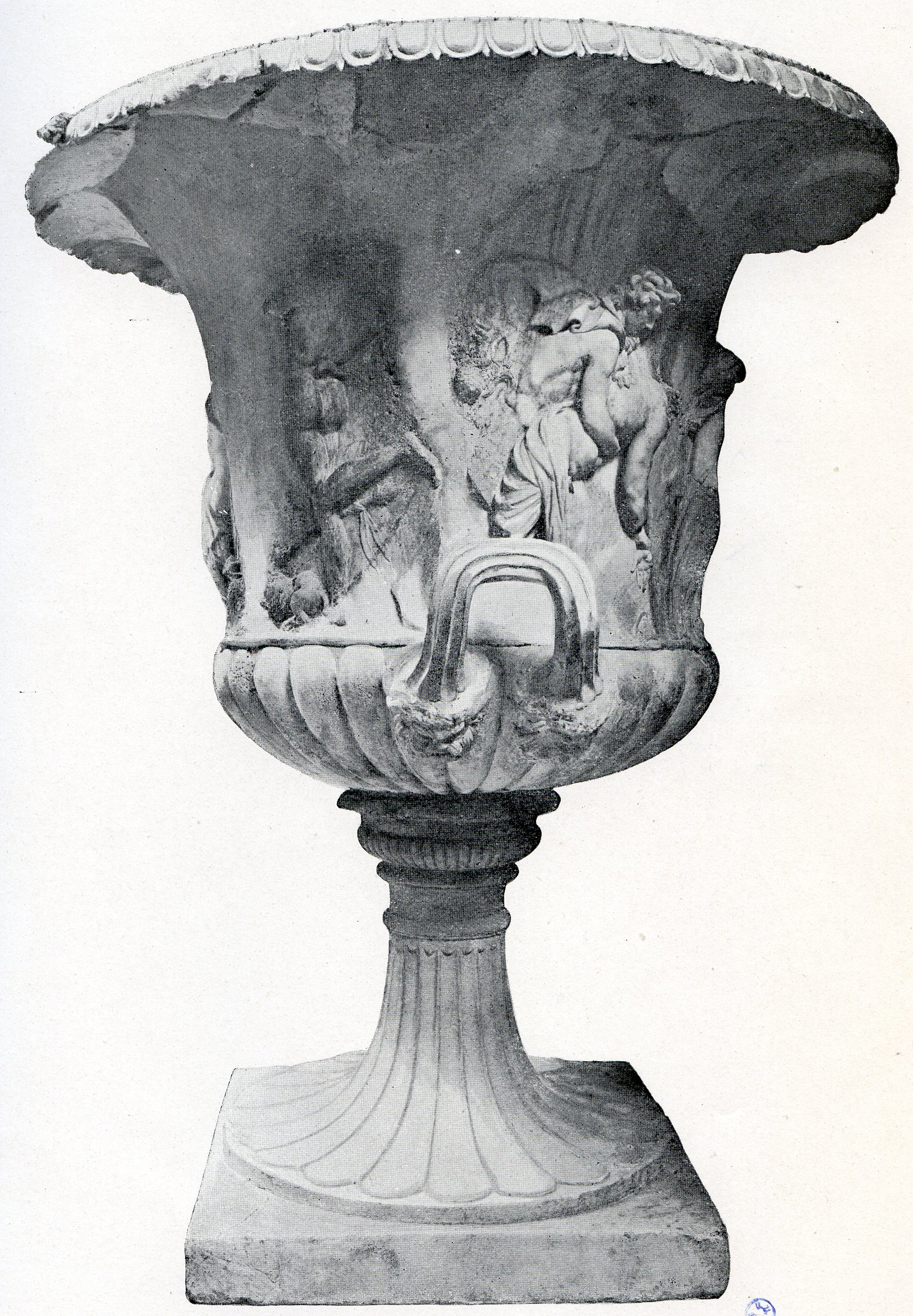 Cratère découvert dans les fouilles de l'épave de Mahdia, catalogue du Musée Alaoui par E. Leroux